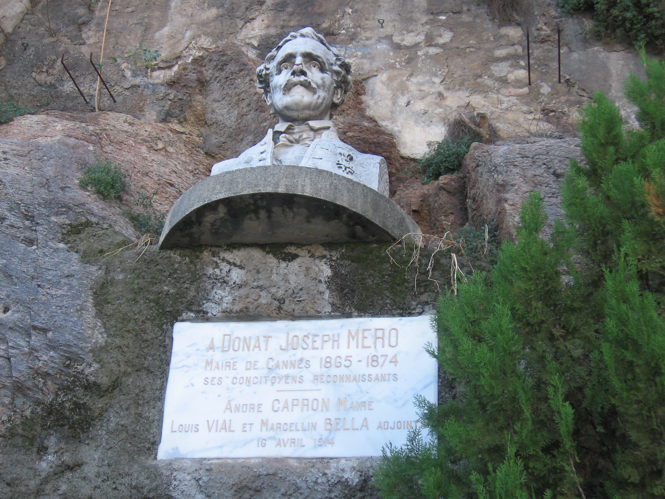 Cannes, buste et plaque commémorative de Donat Joseph MERO maire de cannes 1865-1874, montée vers l Suquet